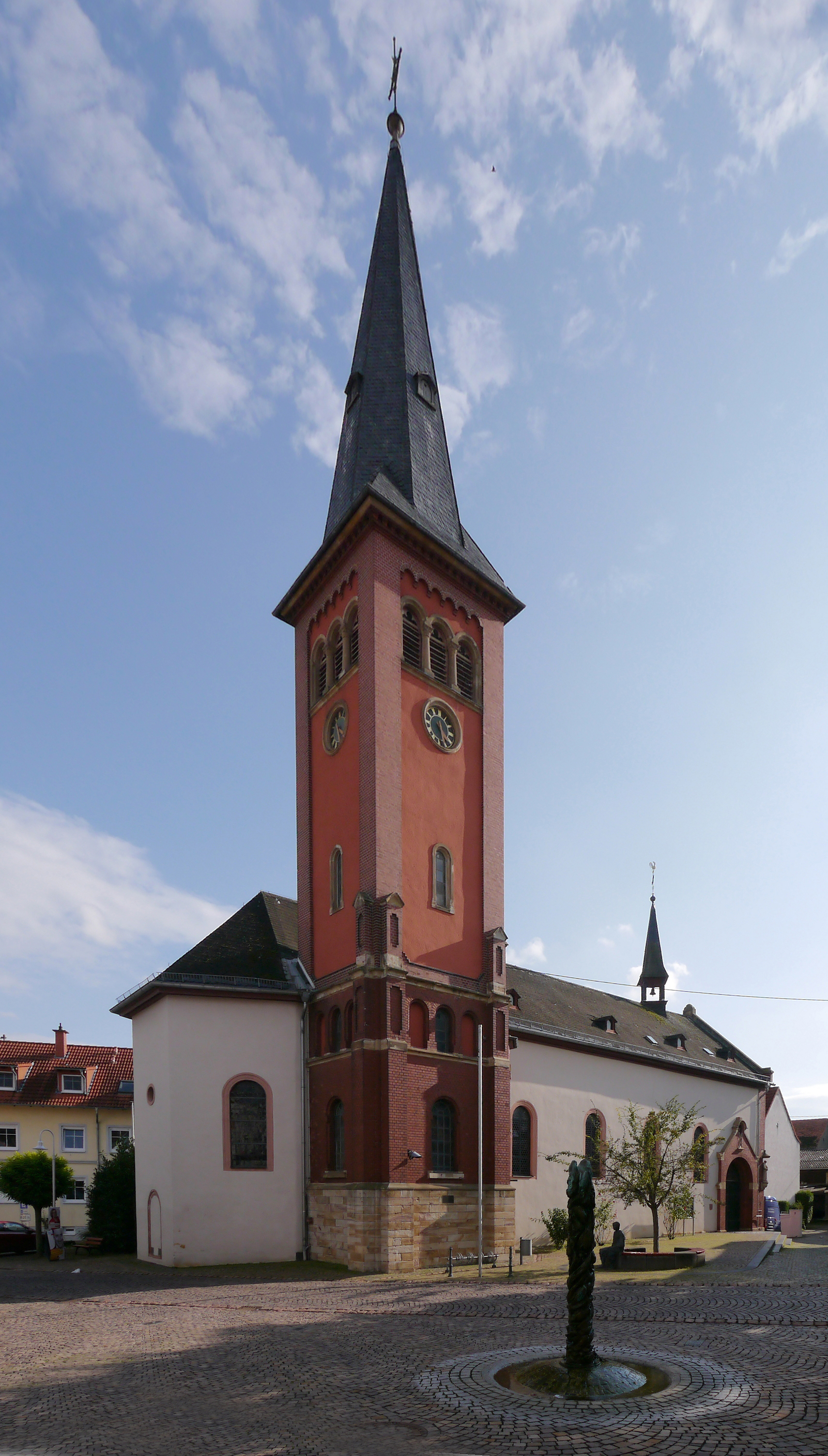 St. Andreas aus Klein-Winternheim (2017)